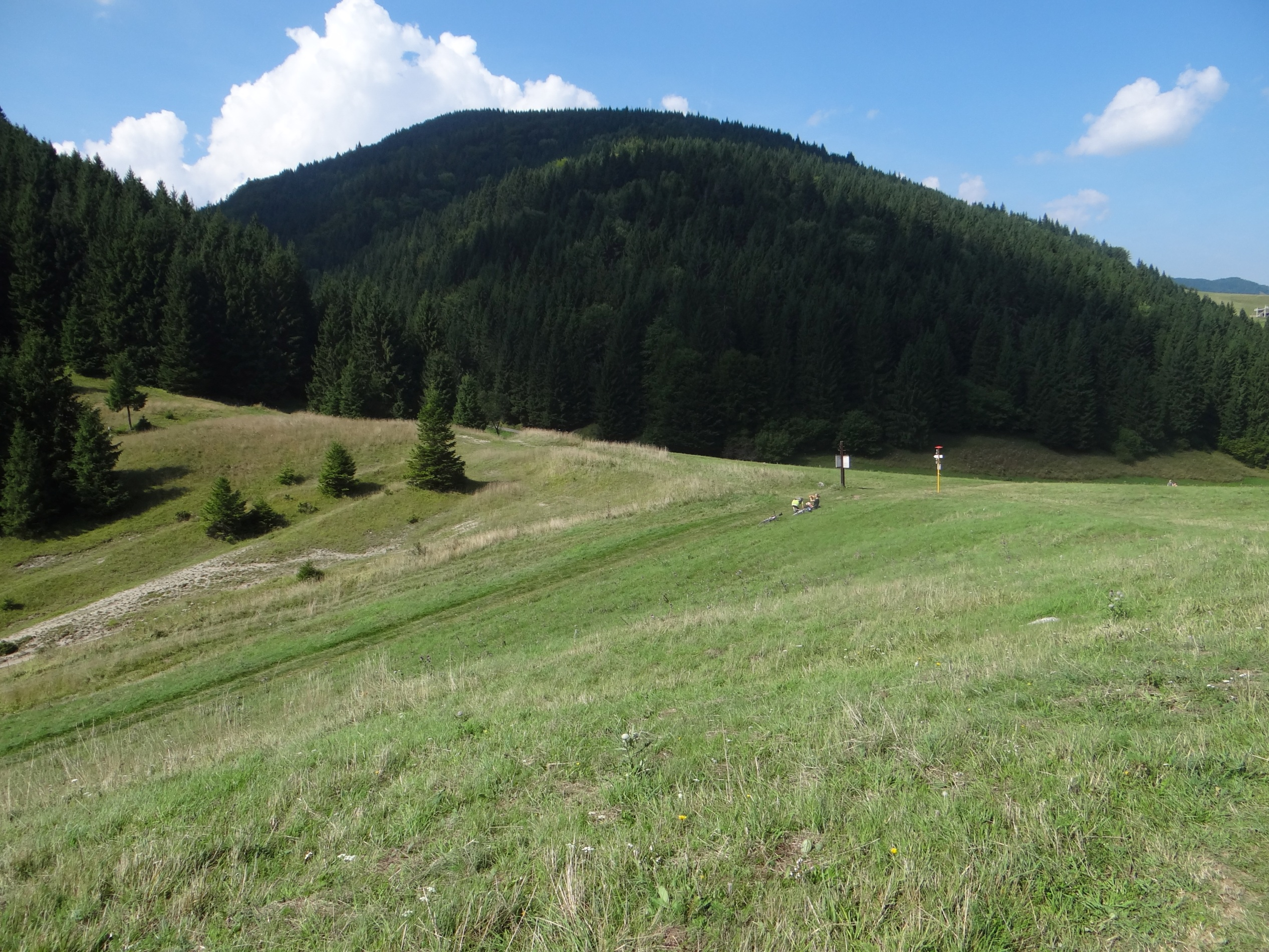 Sedlo Pod Sidorovom i Malinnè